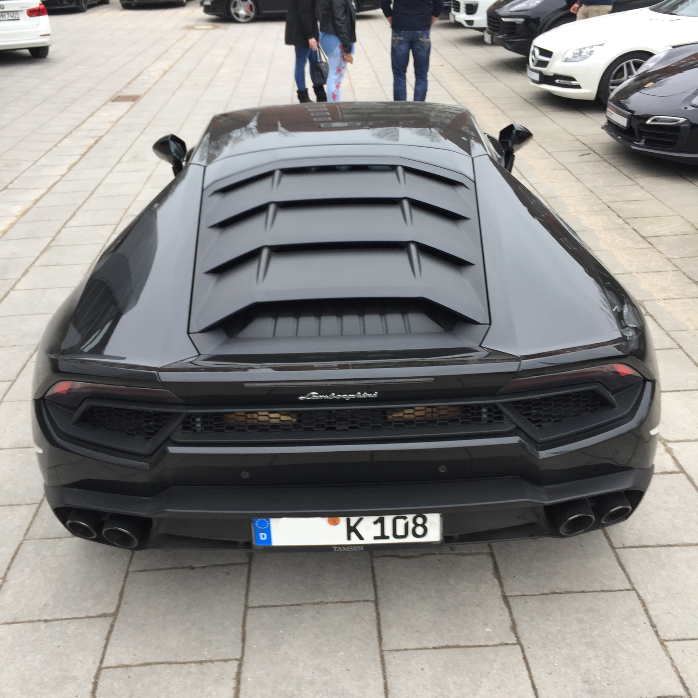 Lamborghini Huracan Motorhaube